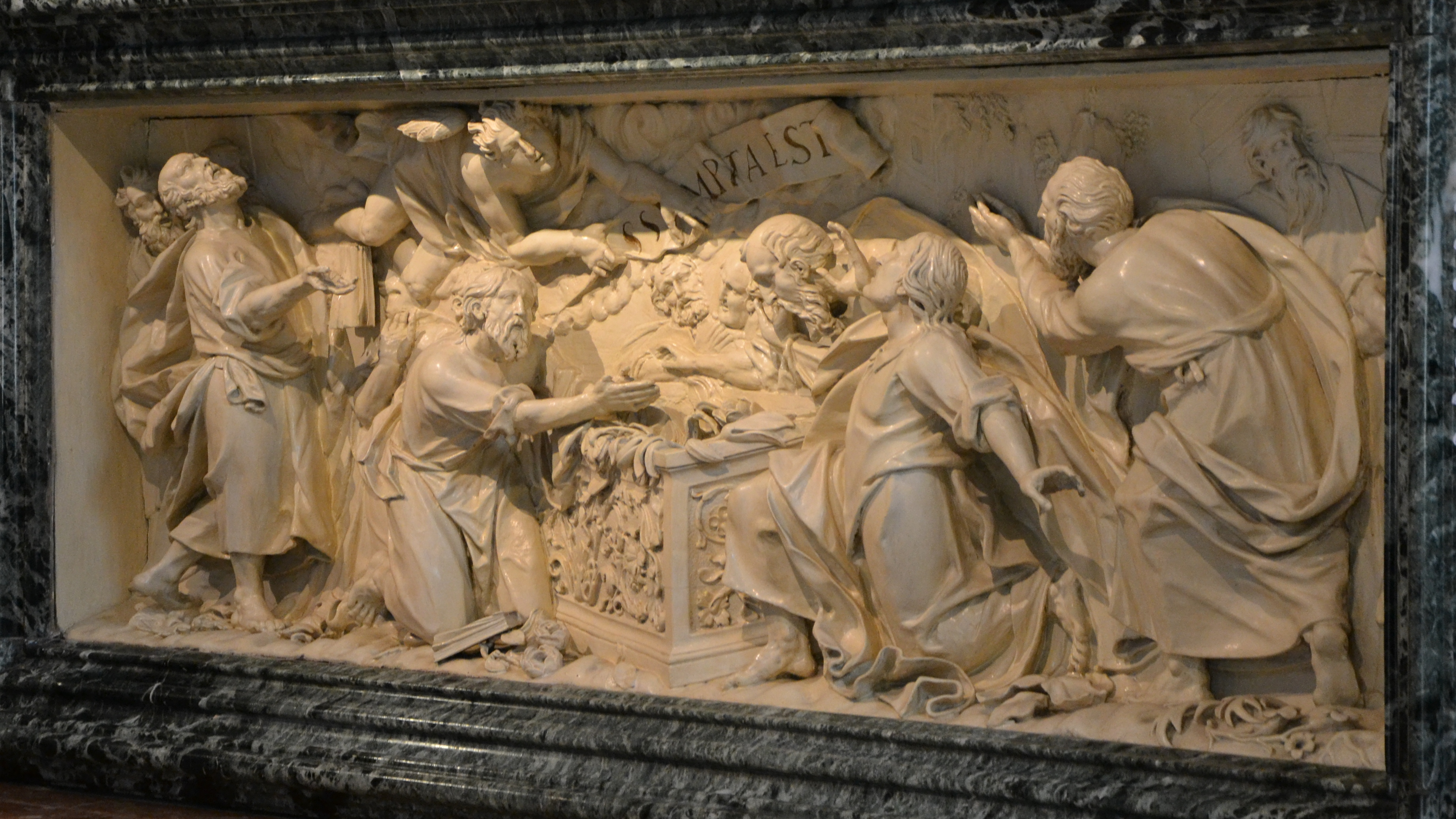 Santa Maria di Canepanova (Pavia) (1492 - sec. XVII)